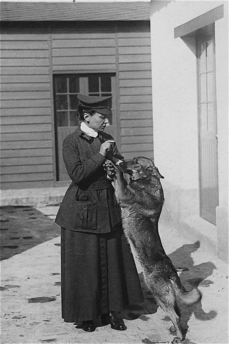 Nicole Girard-Mangin (1878-1919) avec sa chienne Dun A similar image, in the same location, and same outfit, File:Nicole_Girard-Mangin,_1916.jpg is from November 1916 and by Madeleine (née Gebelin) Brès, (1842-1941)